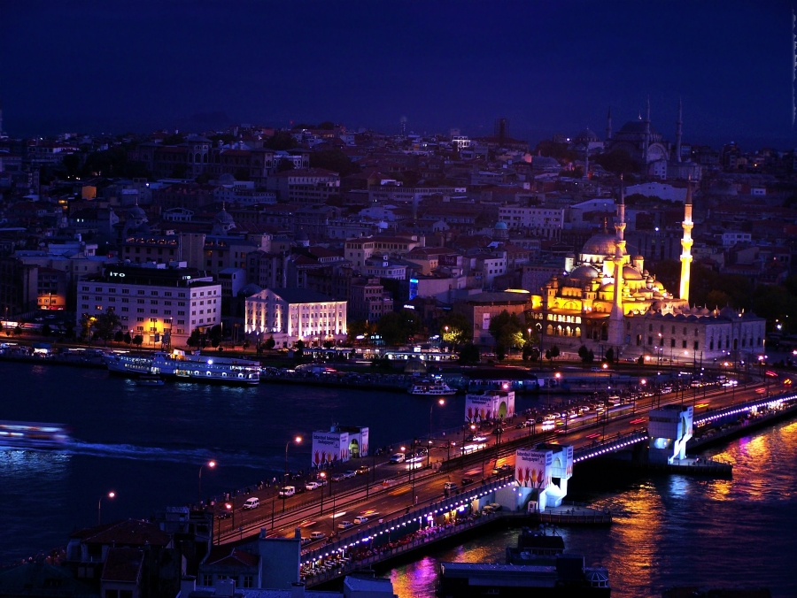 Galata Brücke und Blick auf die Historische Halbinsel